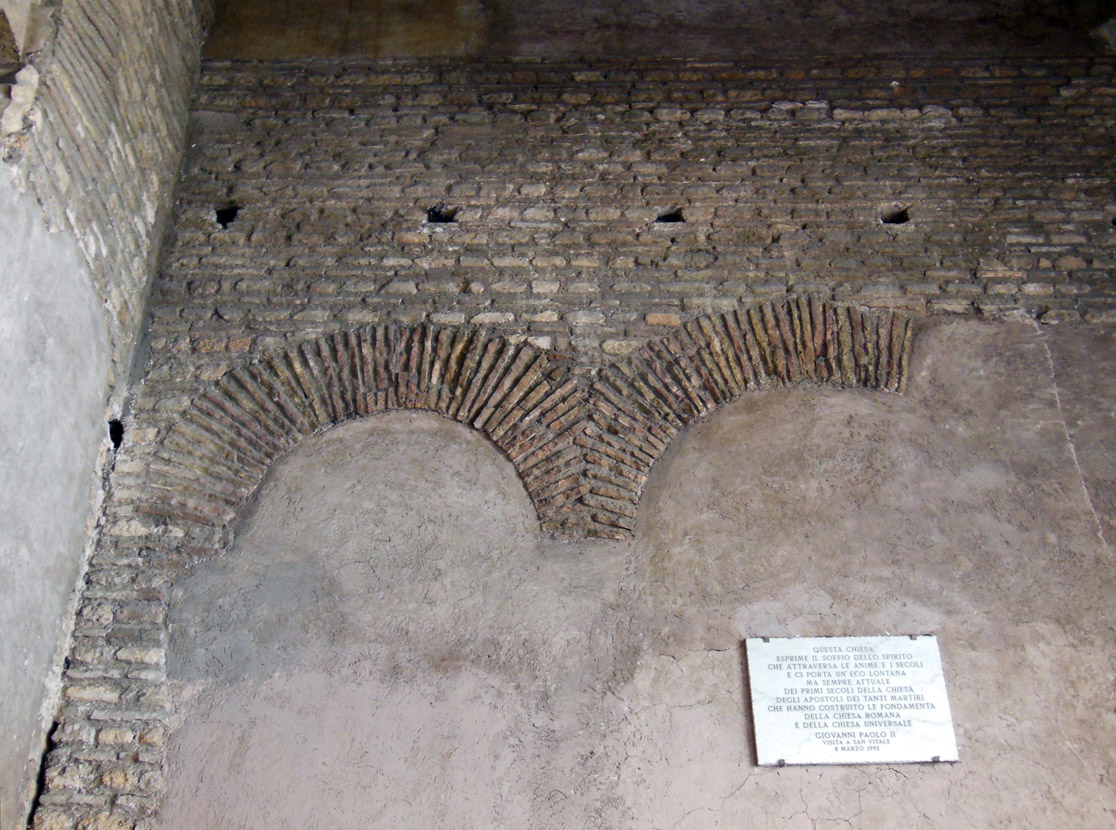 Roma, chiesa di San Vitale (via Nazionale), portico in facciata, arcate murate del lato corto a destra entrando, con lapide a ricordo della visita di Giovanni Paolo II